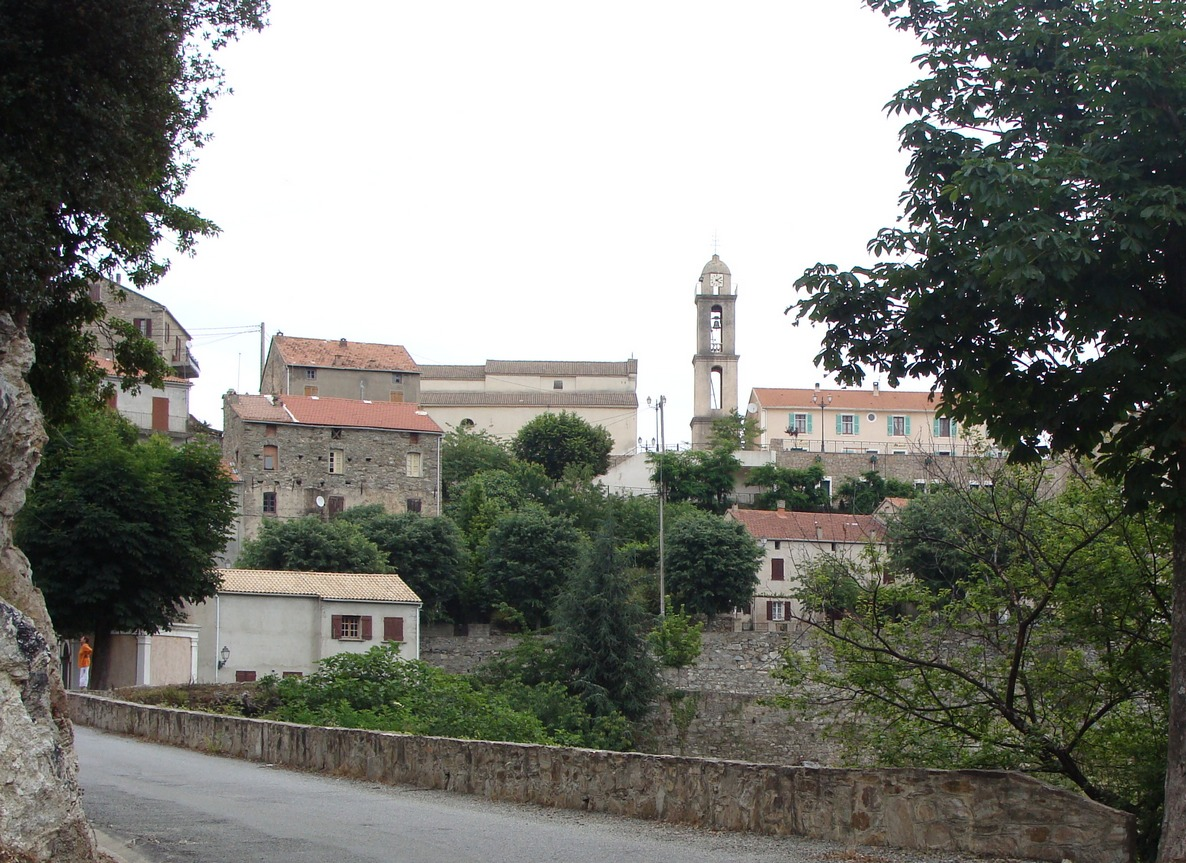 Poggio-di-Nazza vu depuis la route montant d'Abbazia